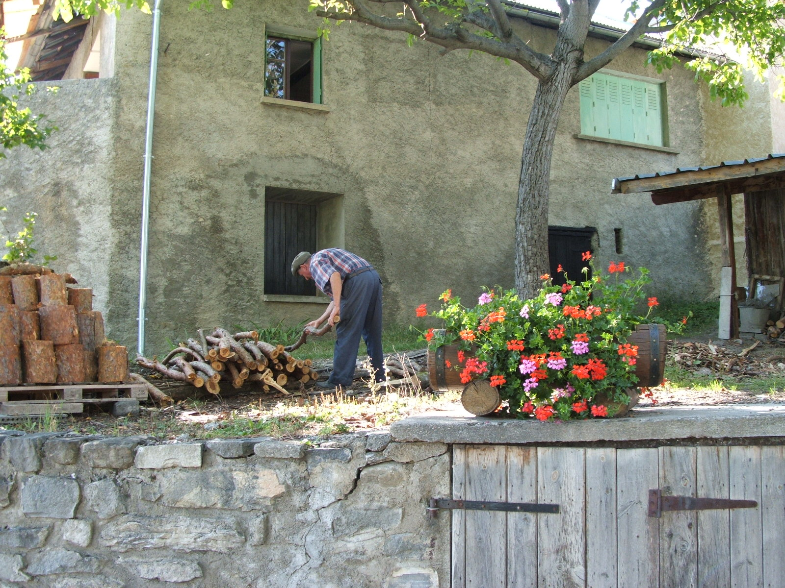 Le Sauze-du-Lac, Hautes-Alpes, France